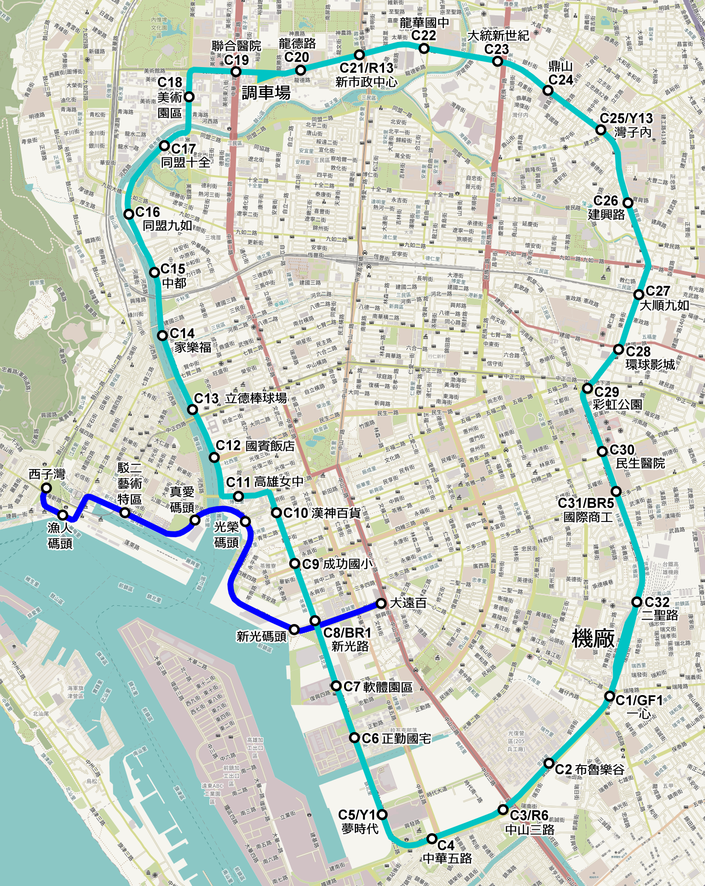 環狀輕軌與水岸輕軌合併前的版本